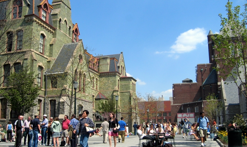 Penn campus